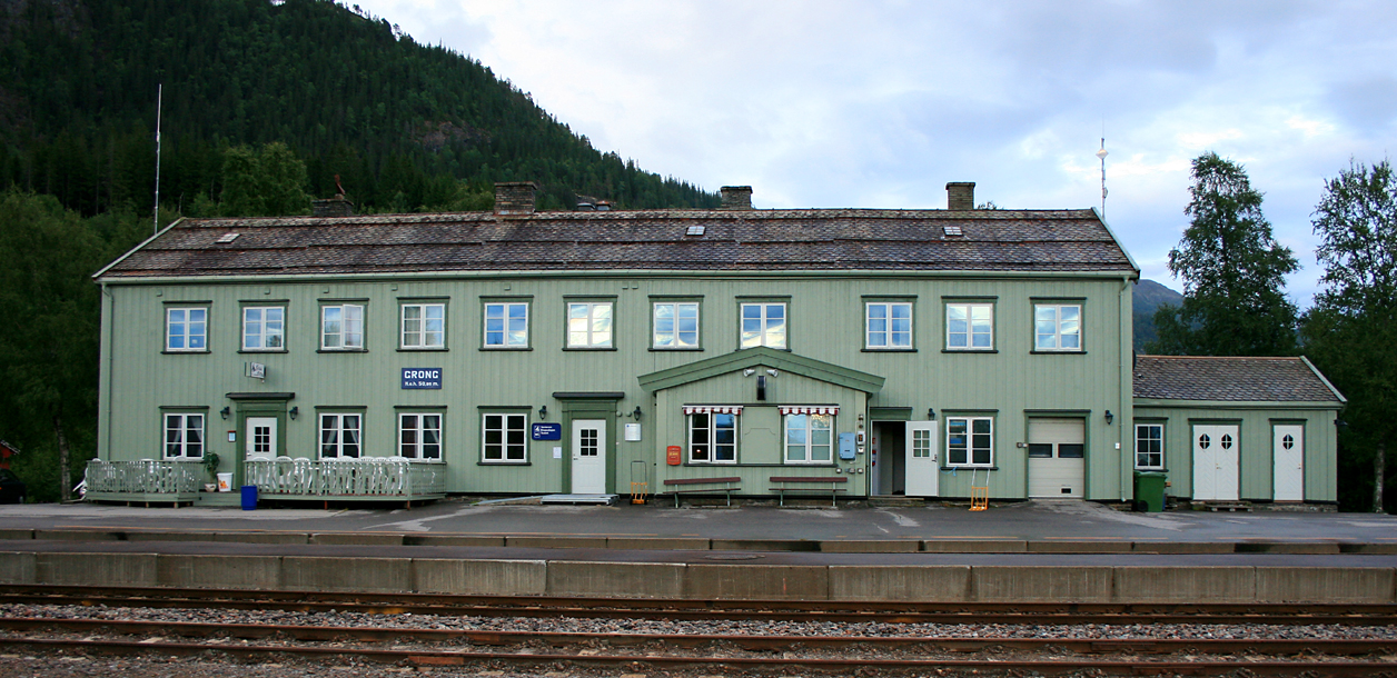 Grong stasjon, Nordlandsbanen.